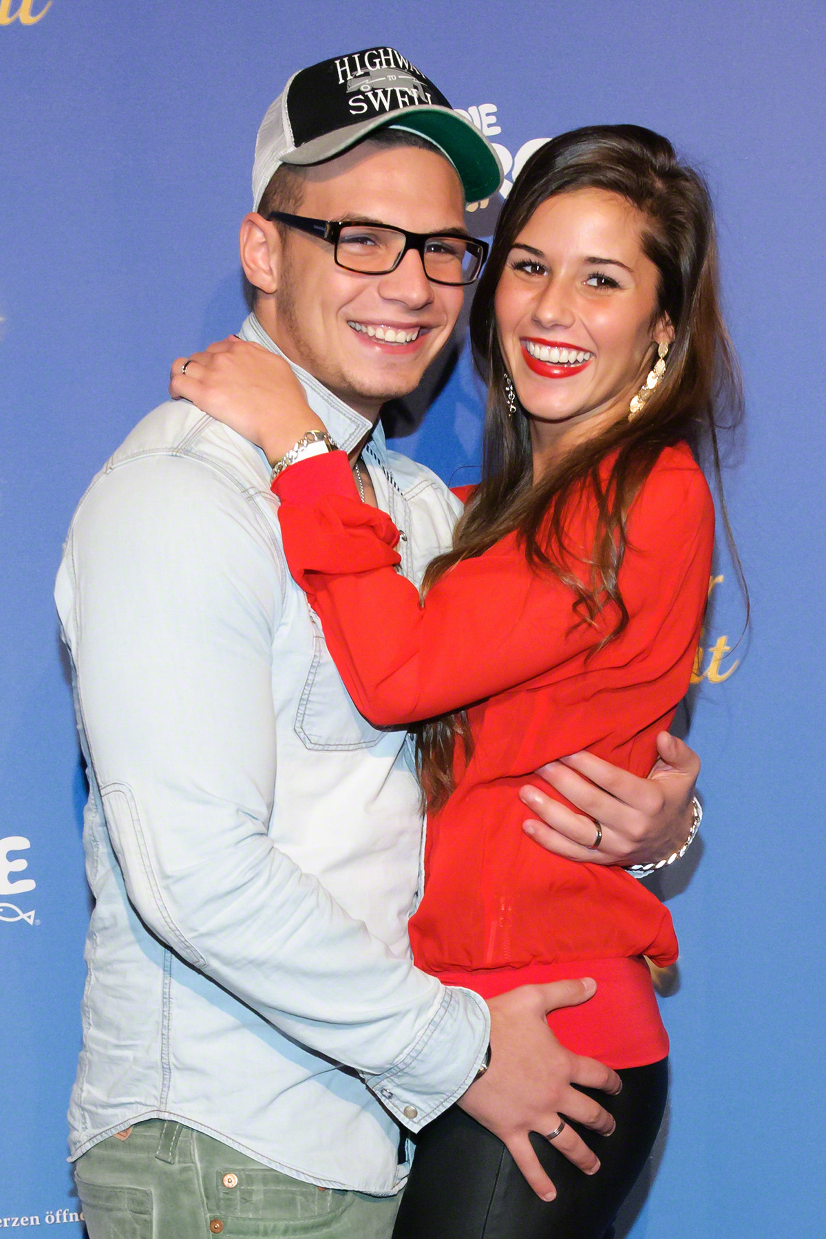 Pietro Lombardi mit seiner Ehefrau Sarah Engels auf der Premiere des Musicals "Vom Geist der Weihnacht" am 28. November 2013 in Düsseldorf.